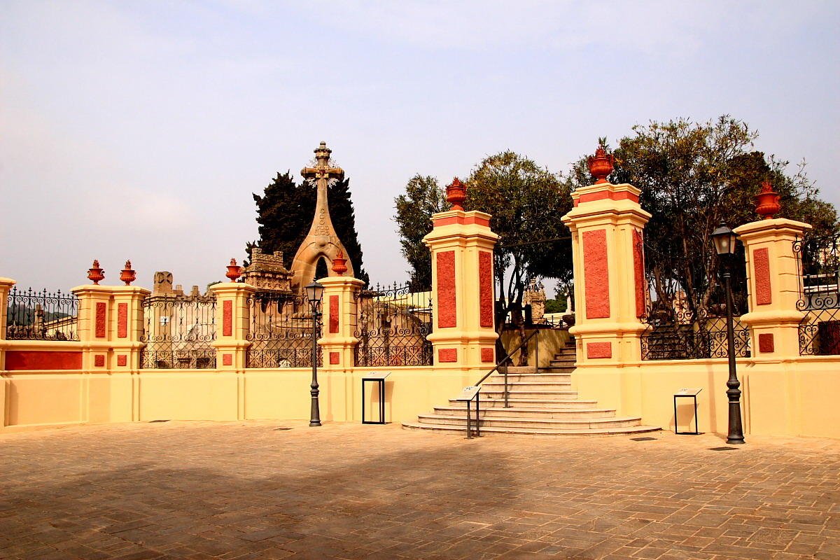 Tanca i porta d'accés al cementiri modernista de Lloret de Mar (la Selva-Catalunya), (1901).